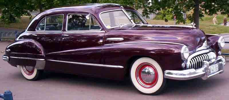 1947 Buick Super Series 50 Model 51 4-Door Sedan